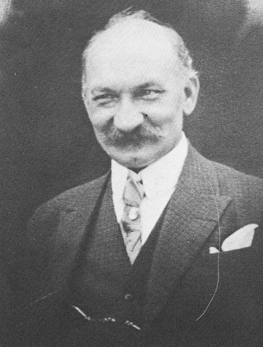 Le peintre luxembourgeois Jean Logeling (1868-1930)